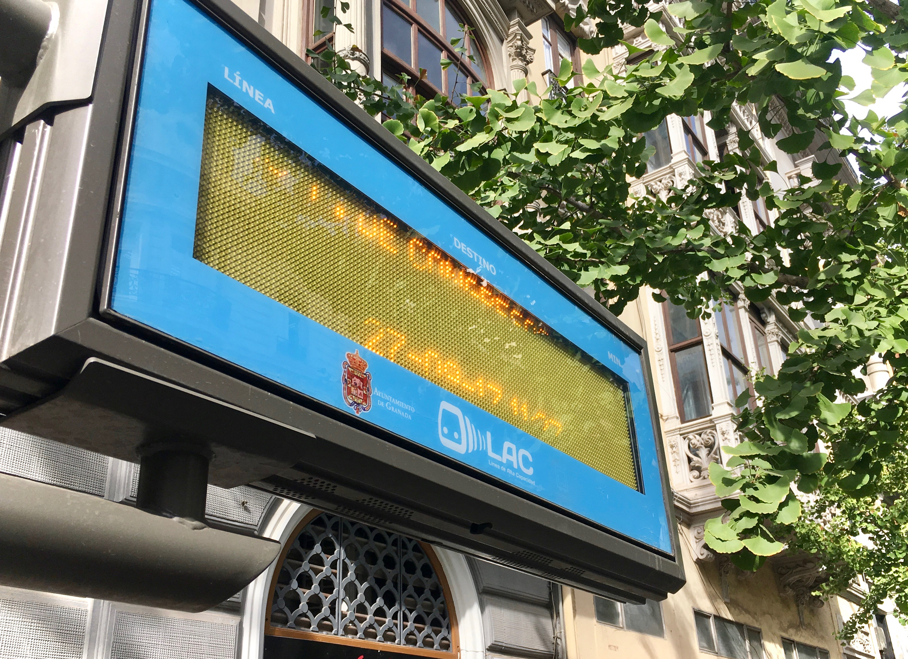 Fotografía de un panel LED de una parada de bus en Granada (España). El texto se entrecorta debido a la exposición de la cámara que realizó la fotografía con respecto a la frecuencia de refresco del panel.